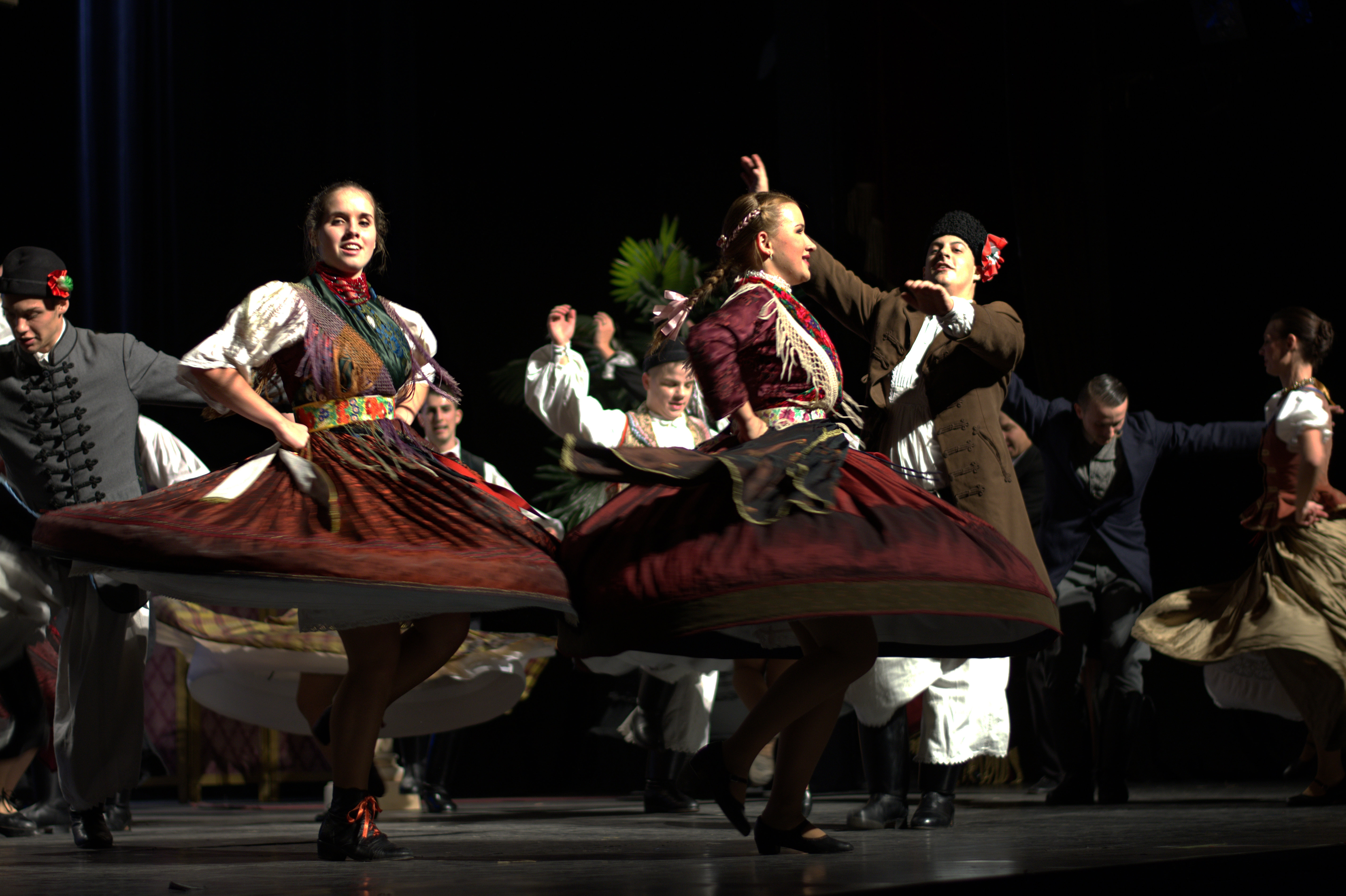 A kiválóra minősült Debreceni Hajdú Táncegyüttes - 2016